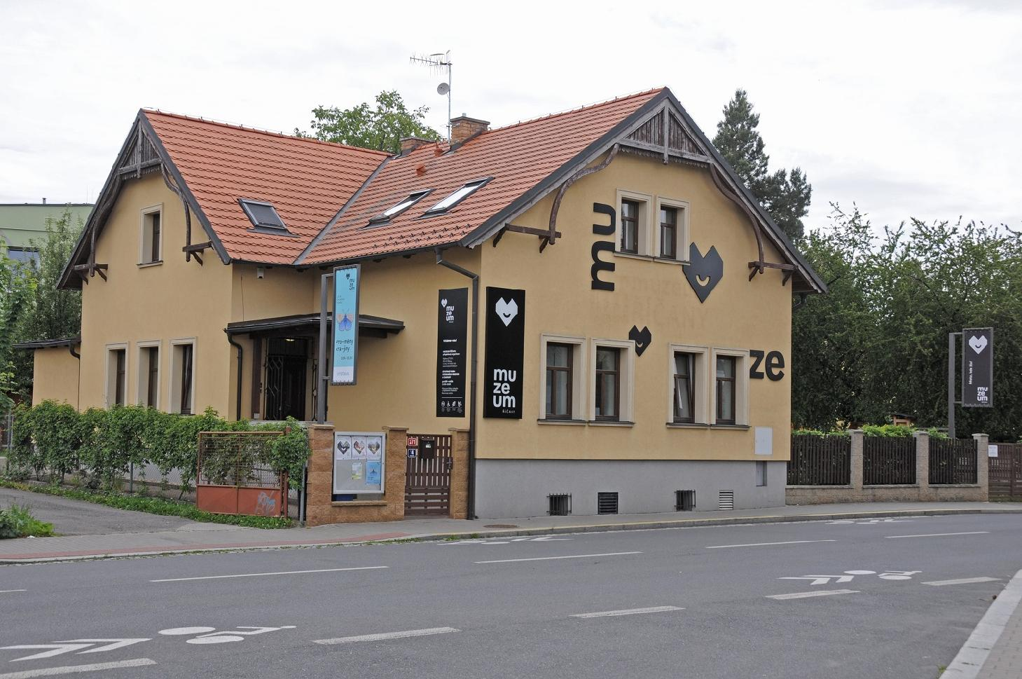 Budova Muzea Říčany v Rýdlově ulici v Říčanech